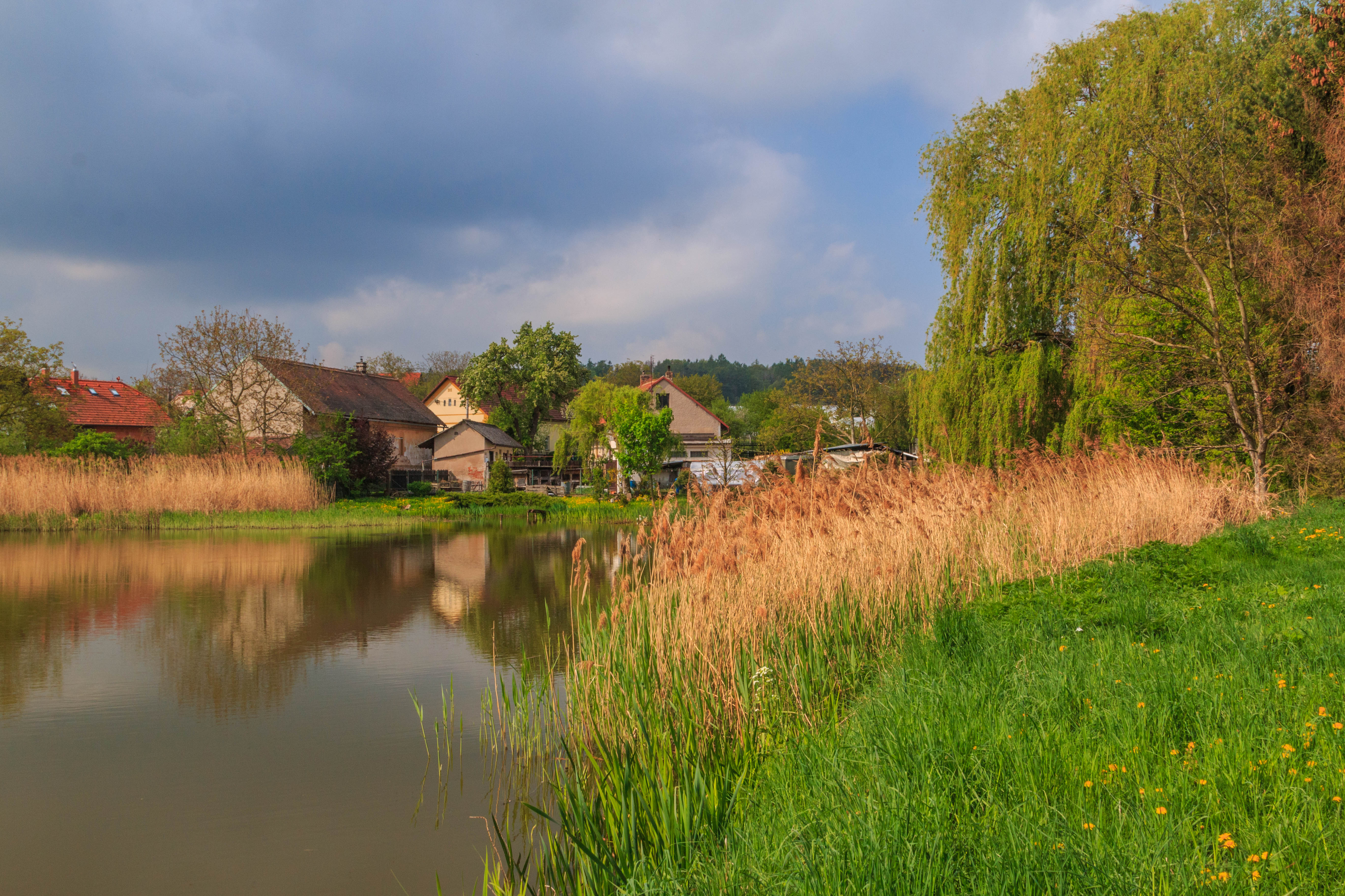 Rybník Rosol u Poběžovic u Přelouče Project: Vodstvo.